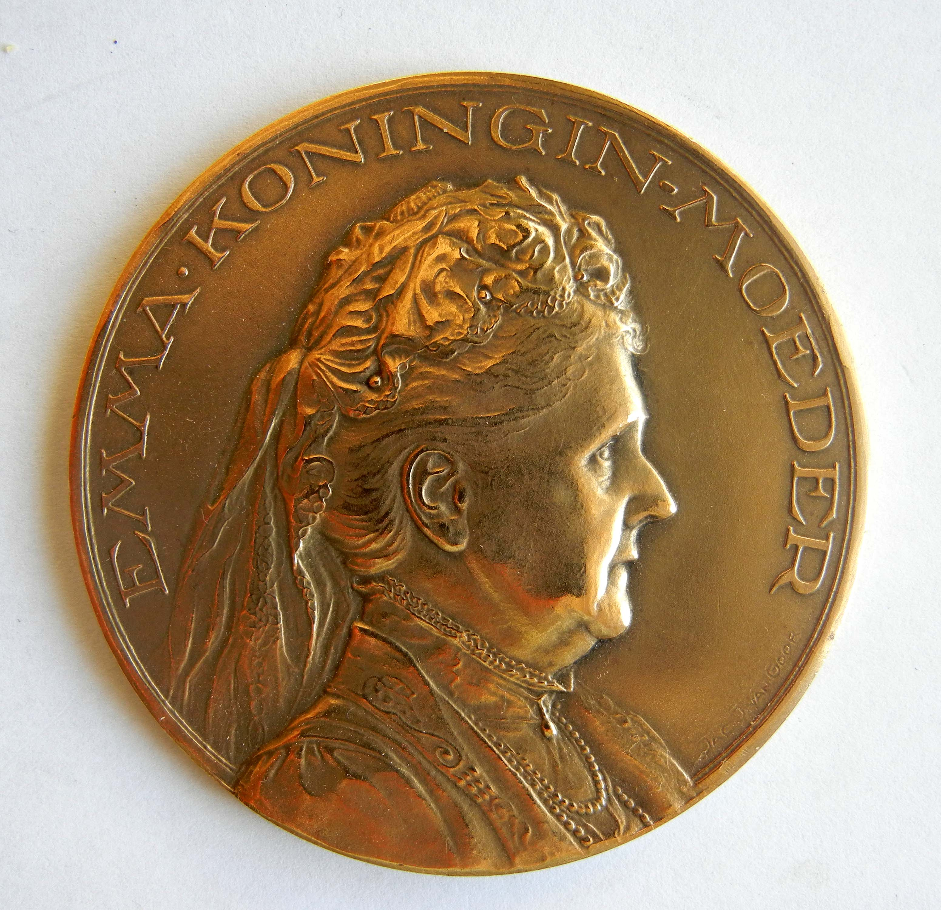 Médaille EMMA KONINGIN-MOEDER (Emma reine-mère) et la devise « Je maintiendrai » 50e anniversaire (1879 – 1929) du règne de Emma de Waldeck-Pyrmont (1858-1934) Graveur : Jac. J van Goor en bronze Diamètre 60 mm Poids 71 grs